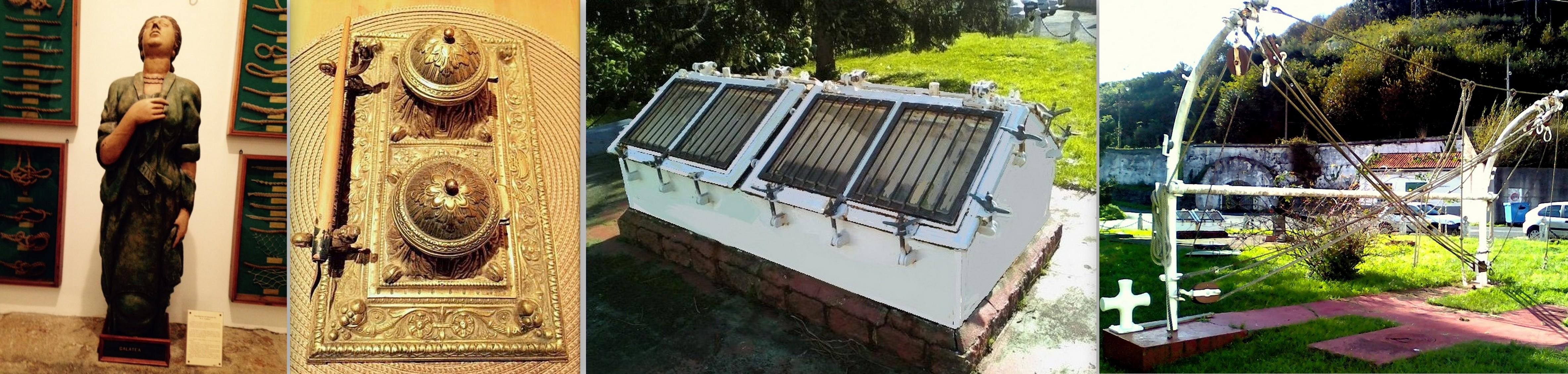 Mascarón de proa, tinteros y pluma del comandante, lumberas, pescante. Todo ello del Buque Escuela Galatea